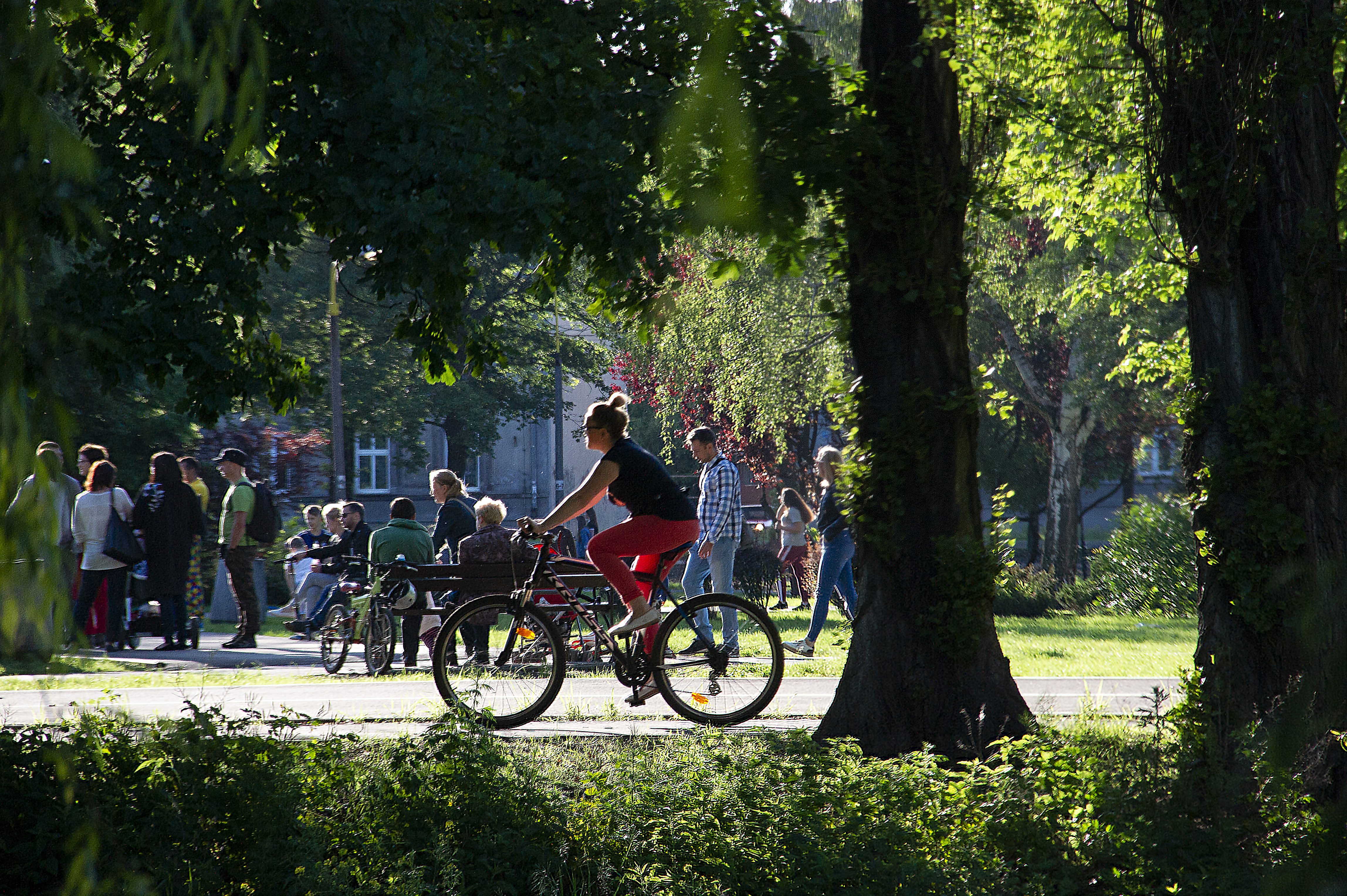 Nowa cześć Parku Sieleckiego w Sosnowcu